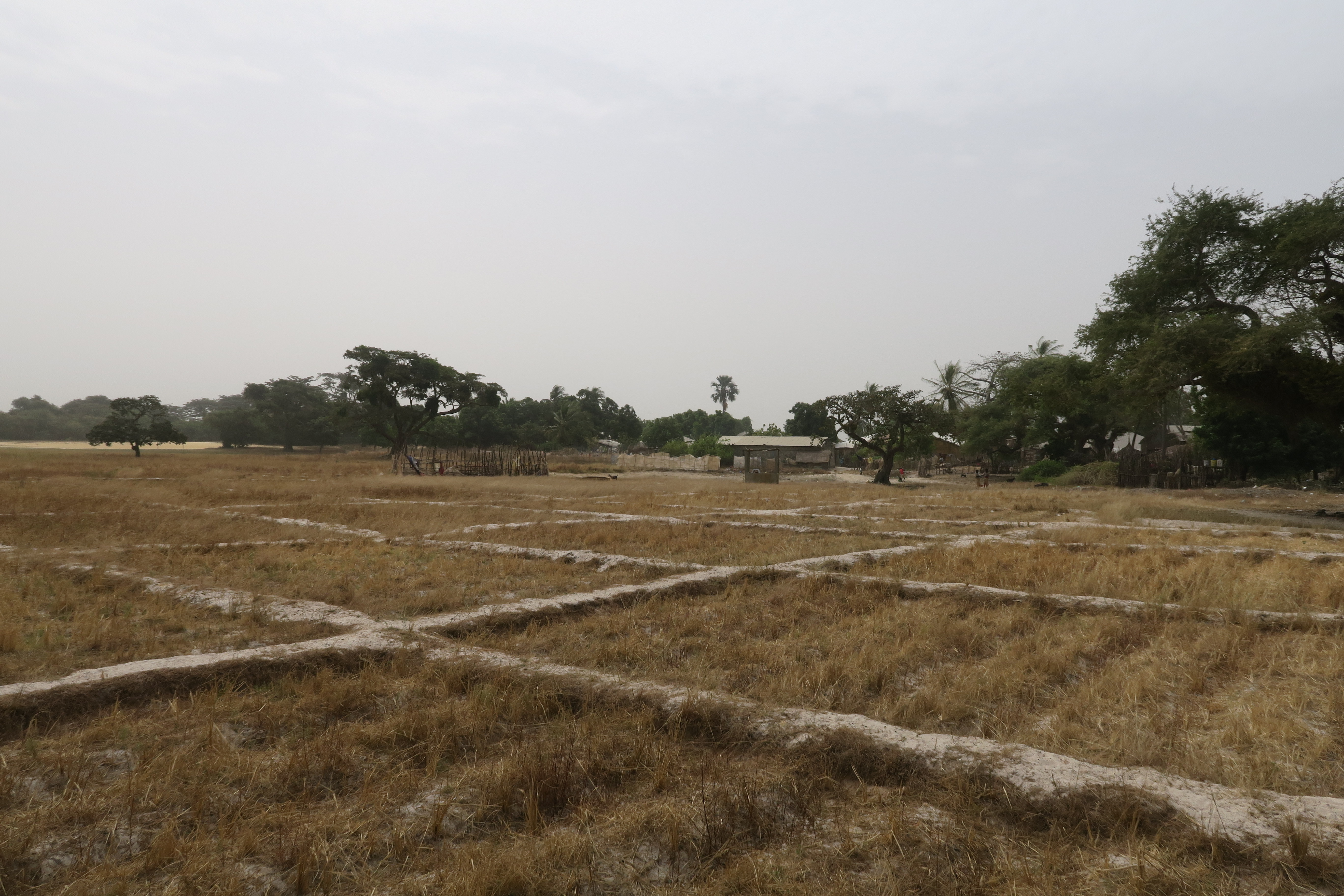 Paysage de rizière en saison sèche sur l'ile d'Ourong